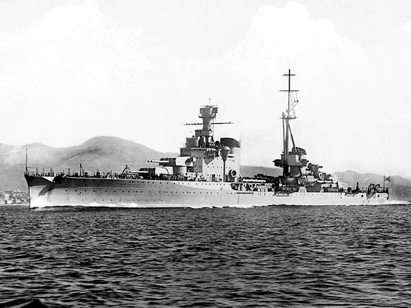 Італійський важкий крейсер «Больцано»